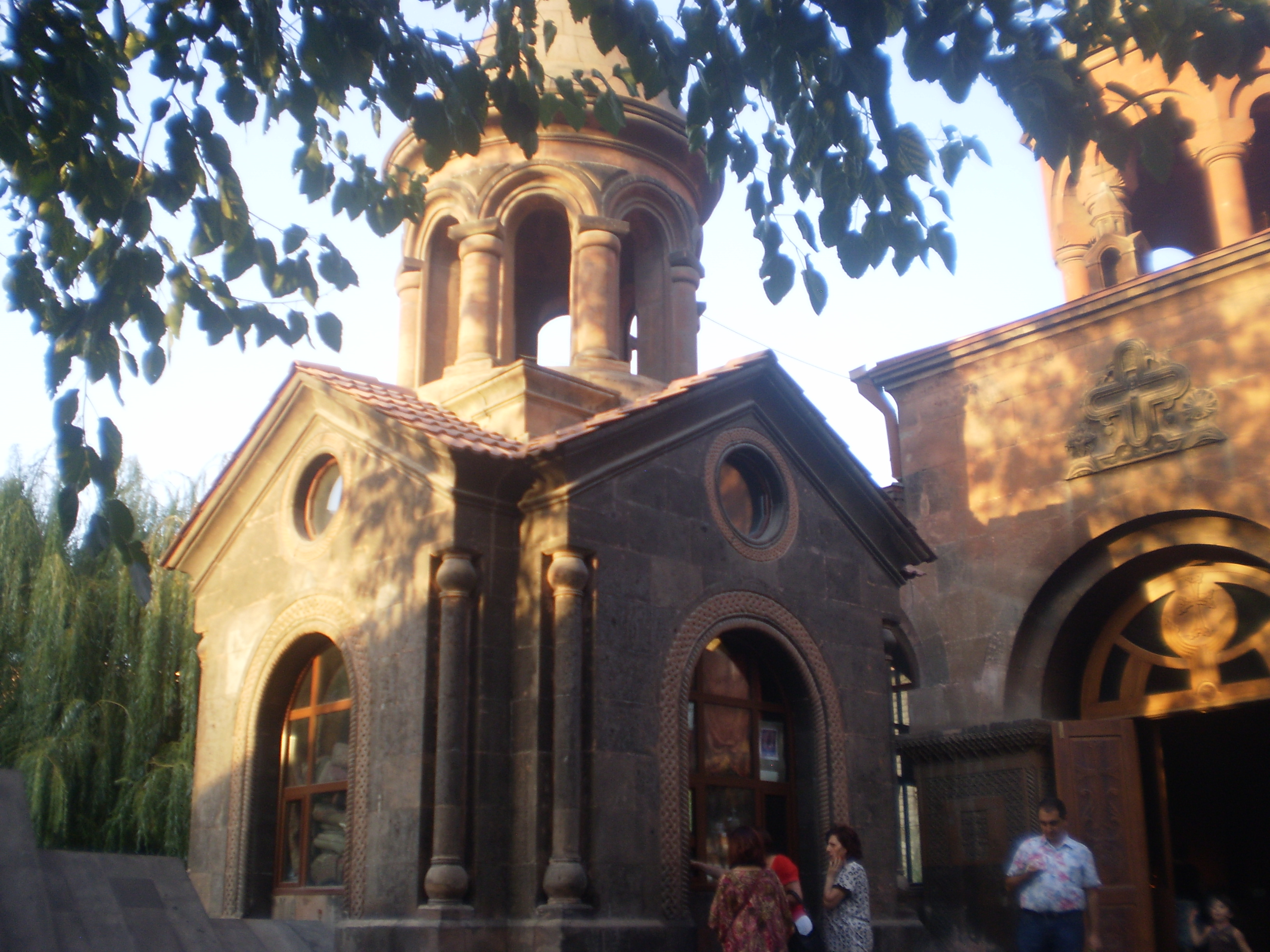 Եկեղեցի Զորավոր Ս. Աստվածածին 6/72.1